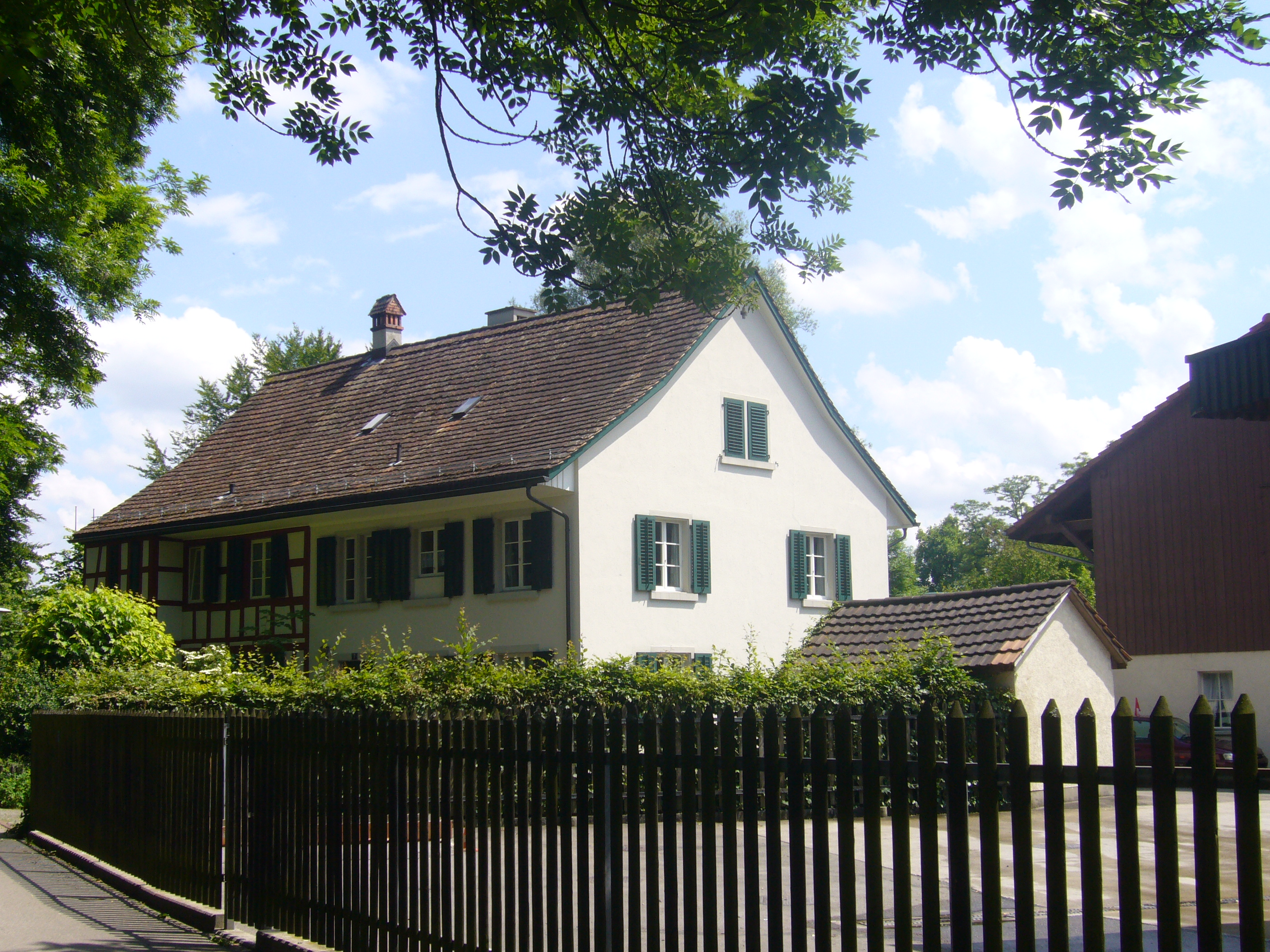 Hof und Nebengebäude am Stadtfallenweg.